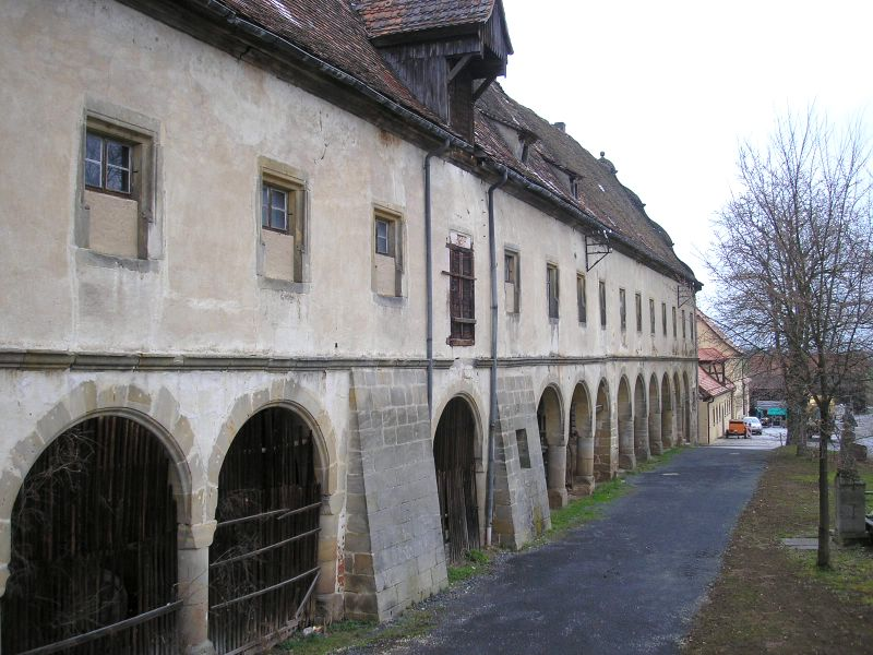 Schloss Gereuth (Unterfranken). Das "Alte Schloss" (Wirtschaftsgebäude) von Westen.